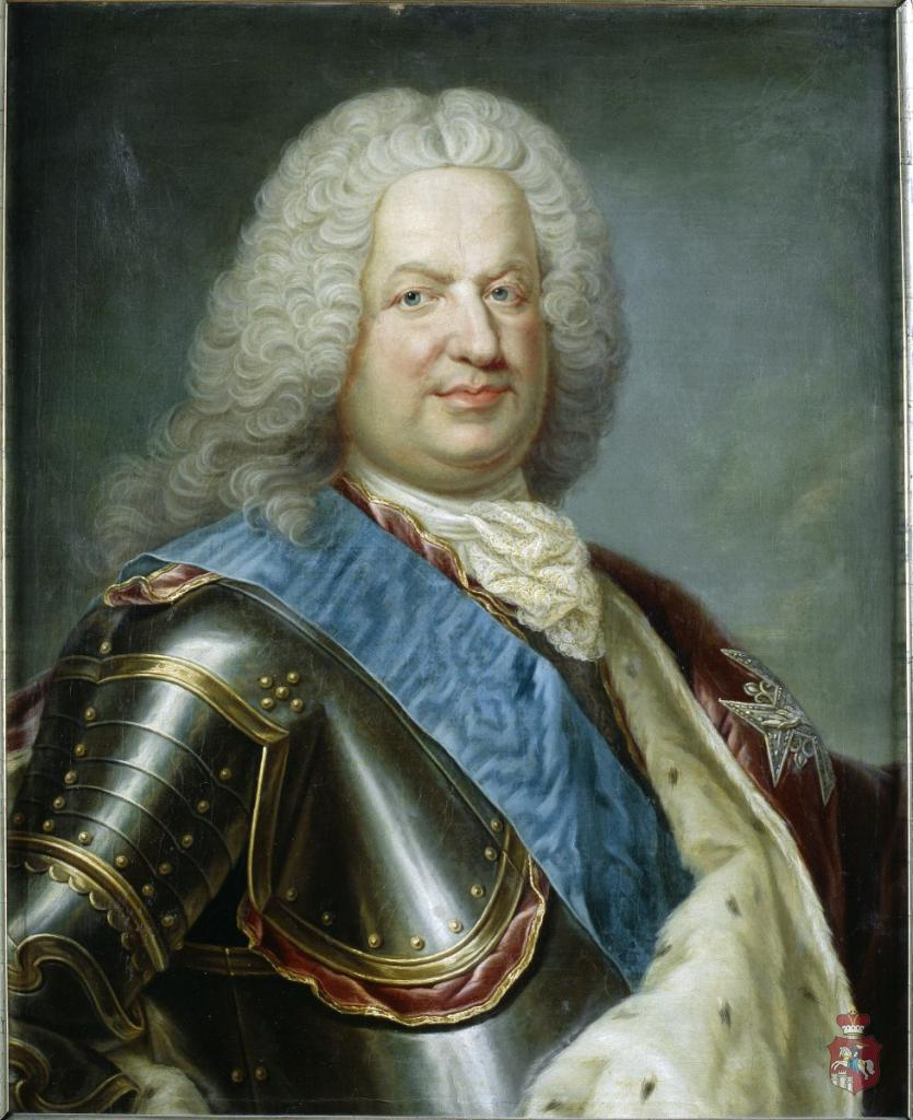 Portrait of Stanislaus Leszczynski (1677-1766)